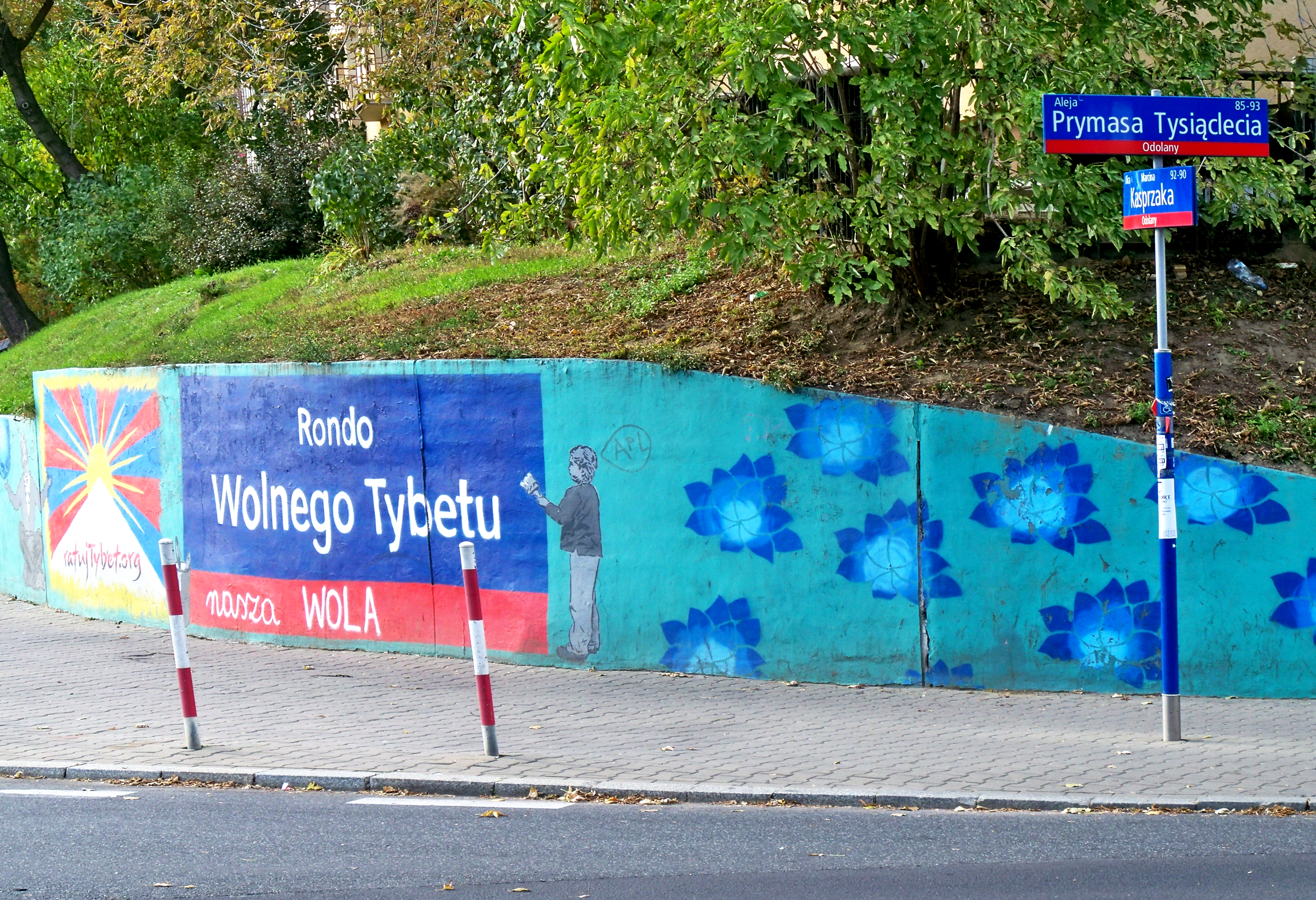 Galeria Tybetańska. Zespół murali wzdłuż al. Prymasa Tysiąclecia w Warszawie. Większość na filarach estakady nad rondem Tybetu. Rondo Wolnego Tybetu.